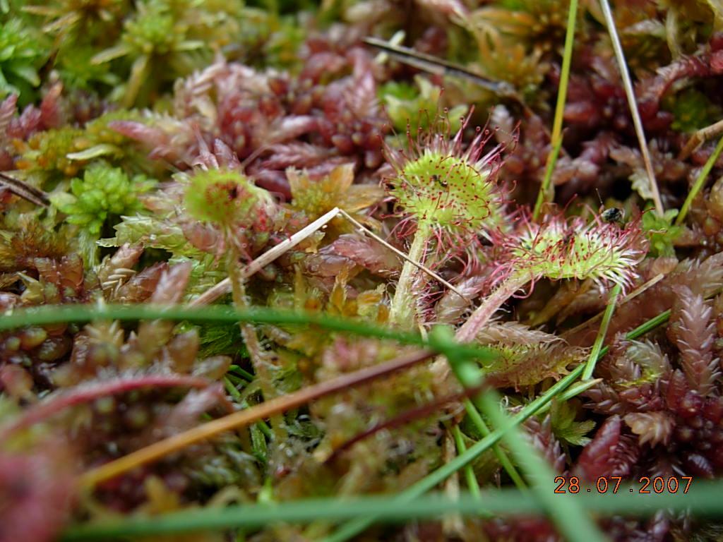 Drosera rotundifolia